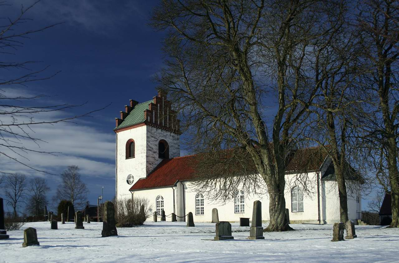 Stoby kyrka från SÖ